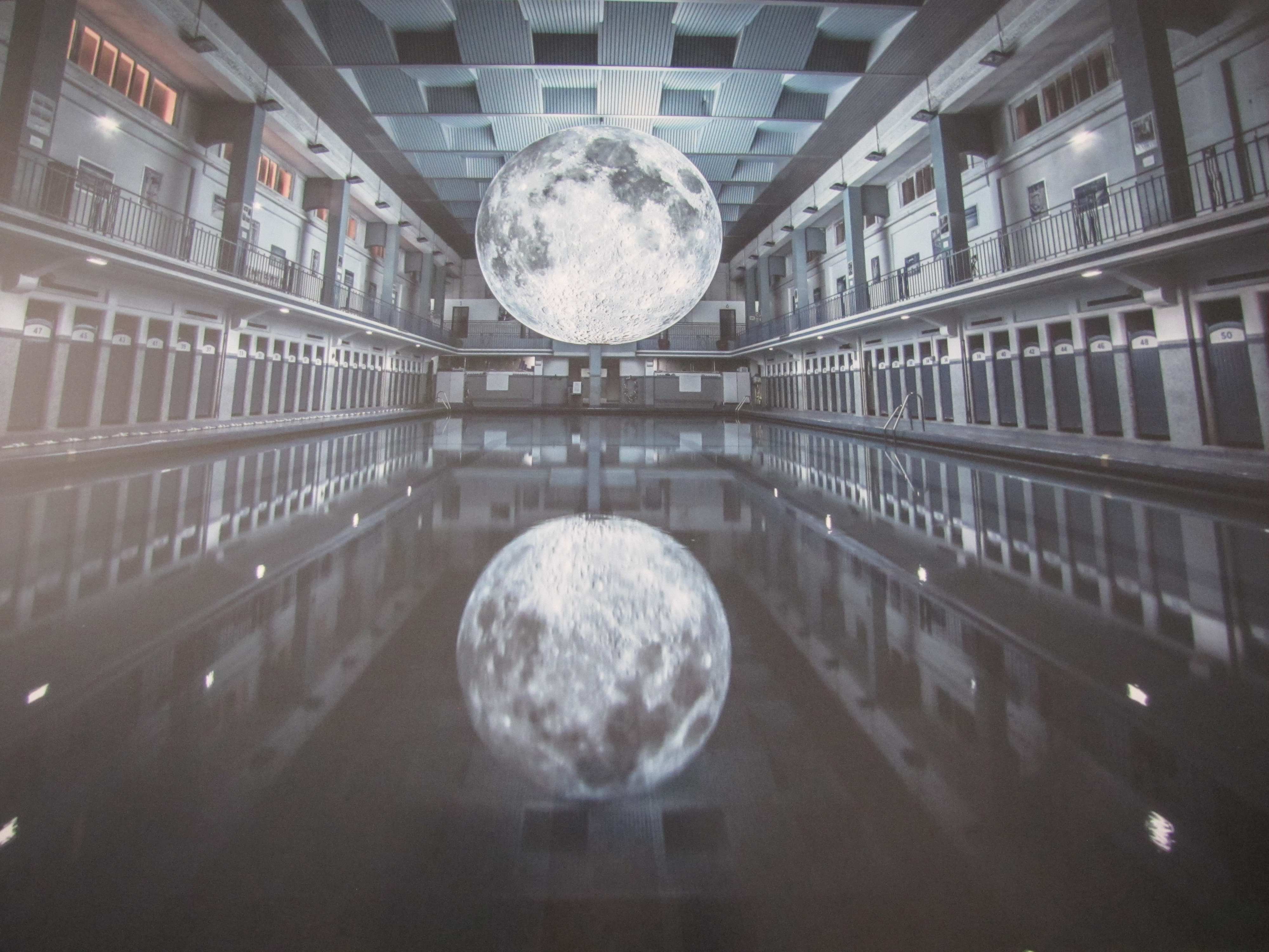 Exposée en 2017 (puis son double en 2018 au festival "Les tombées de la nuit") à Rennes.